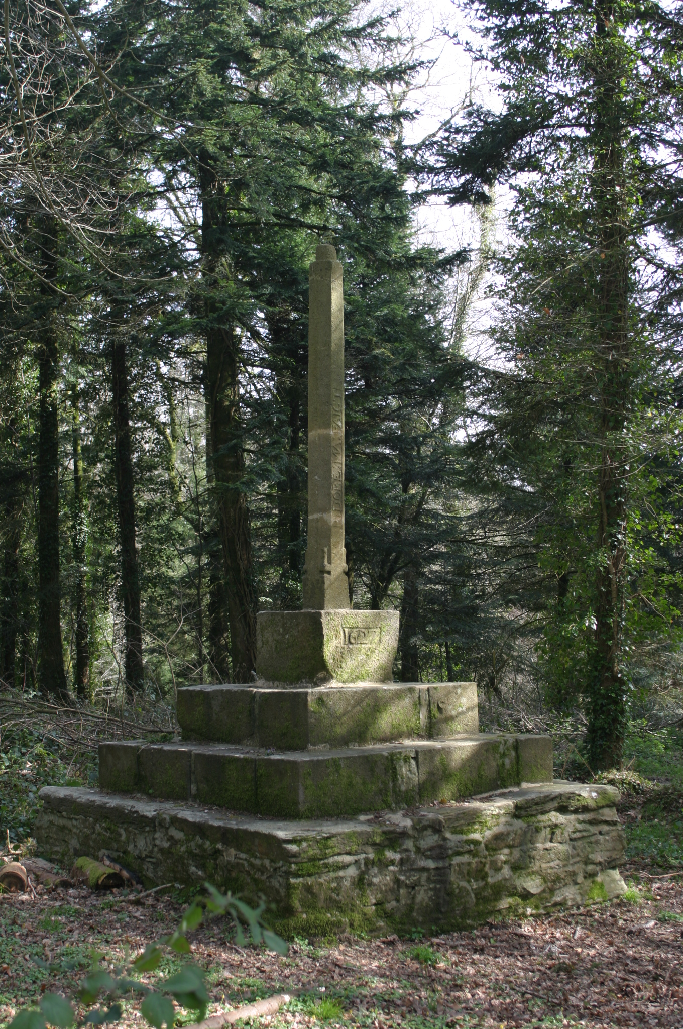 Hanvec, Calvaire Forêt du Cranou, près de la fontaine Saint-Conval